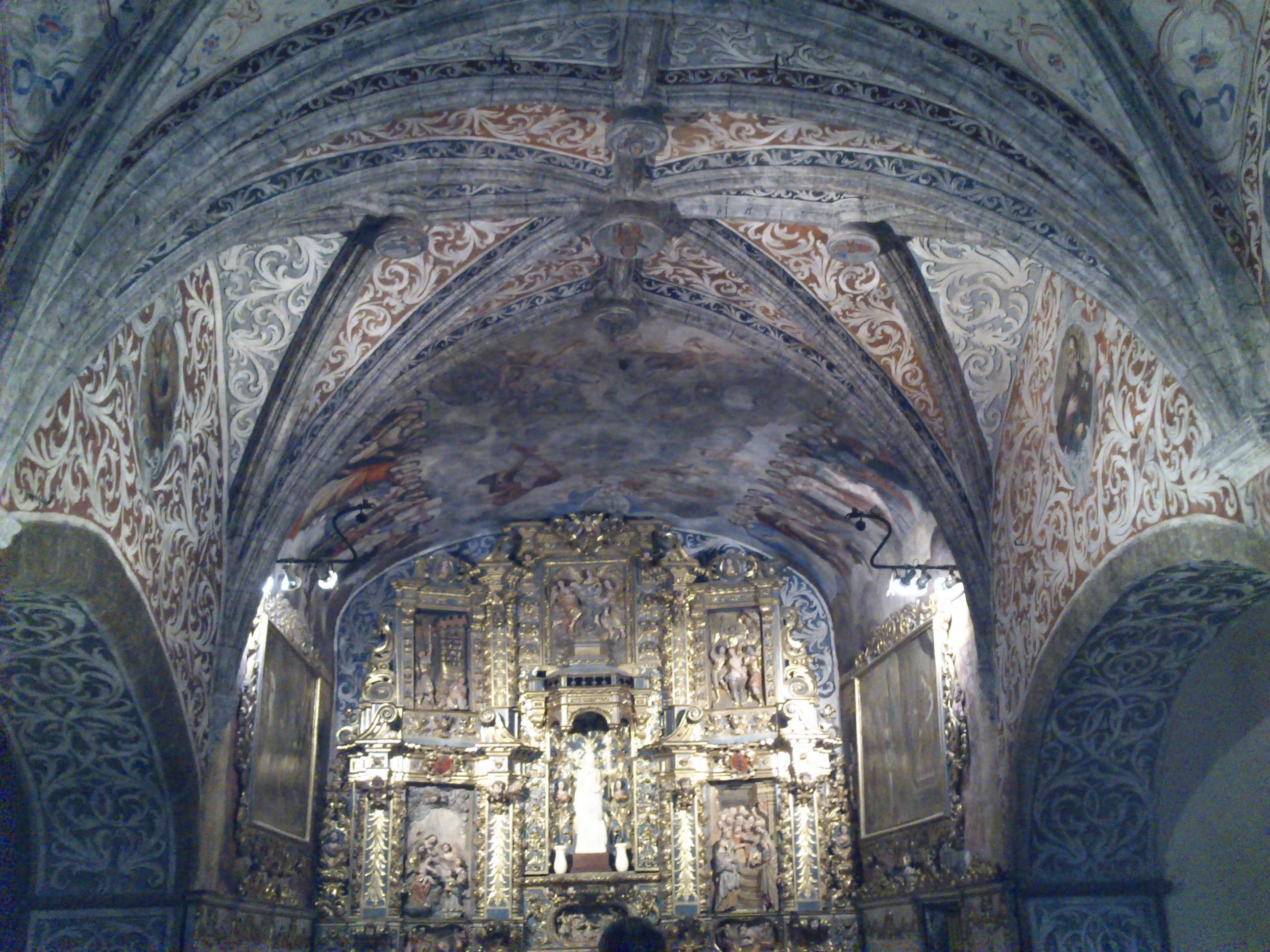 Ermita de Santa Caterina (Torroella de Montgrí)